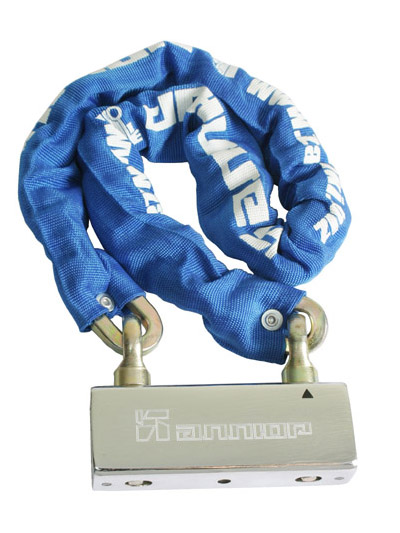 Велосипедный замок АЛЛЮР ВС-Ц10